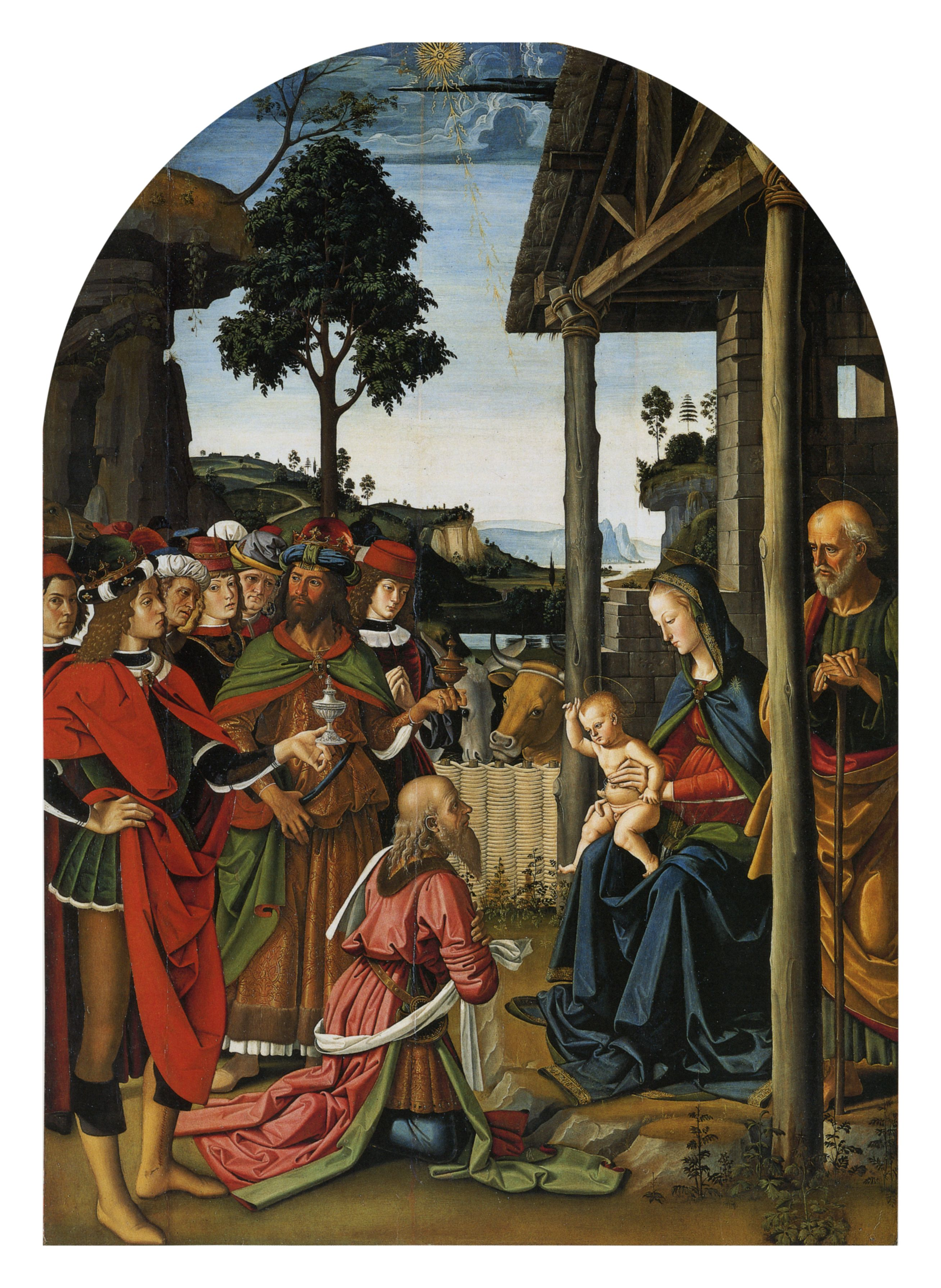 Pietro Perugino: Adorazione dei Magi. Cat. no. 6 in Vittoria Garibaldi: Perugino. Catalogo completo. Octavo, Firenze 2000, ISBN 88-8030-091-1